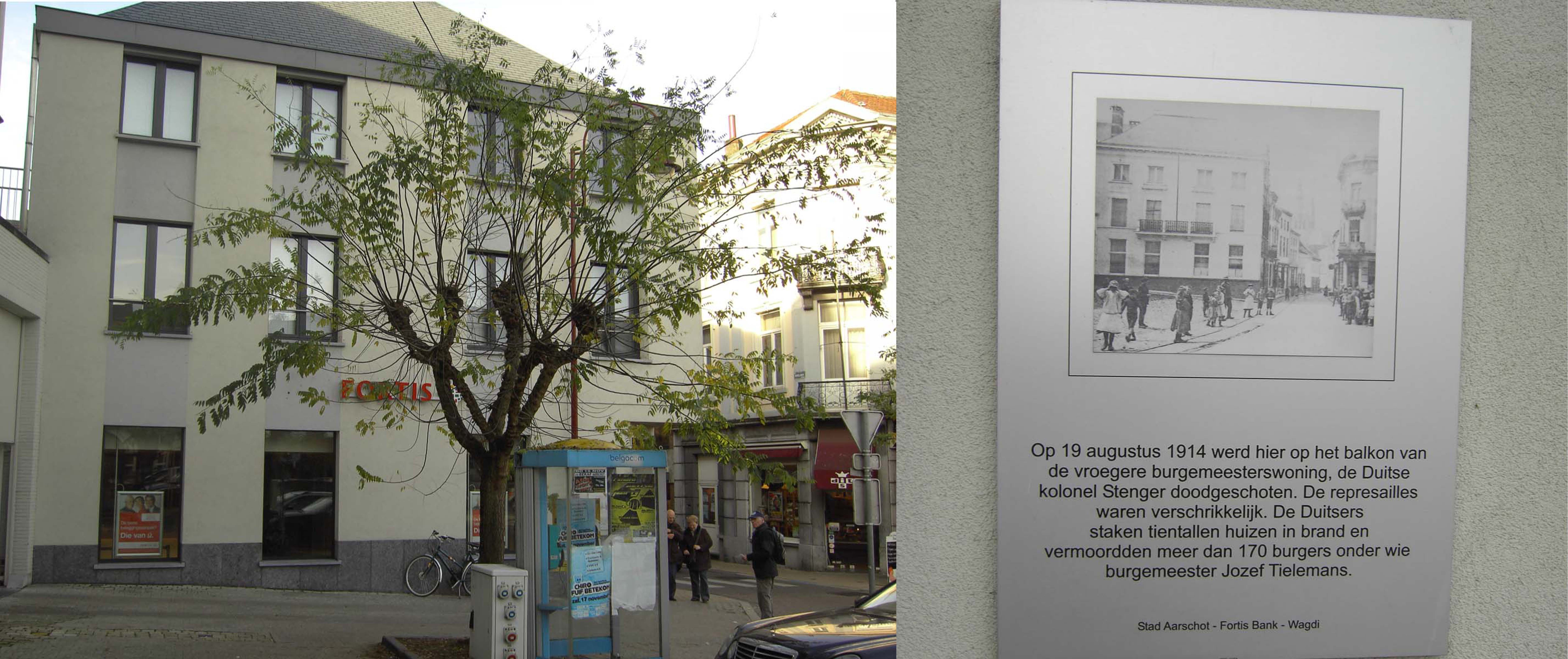 Aarschot - voormalige woning van burgemeester Tielemans tijdens WO I